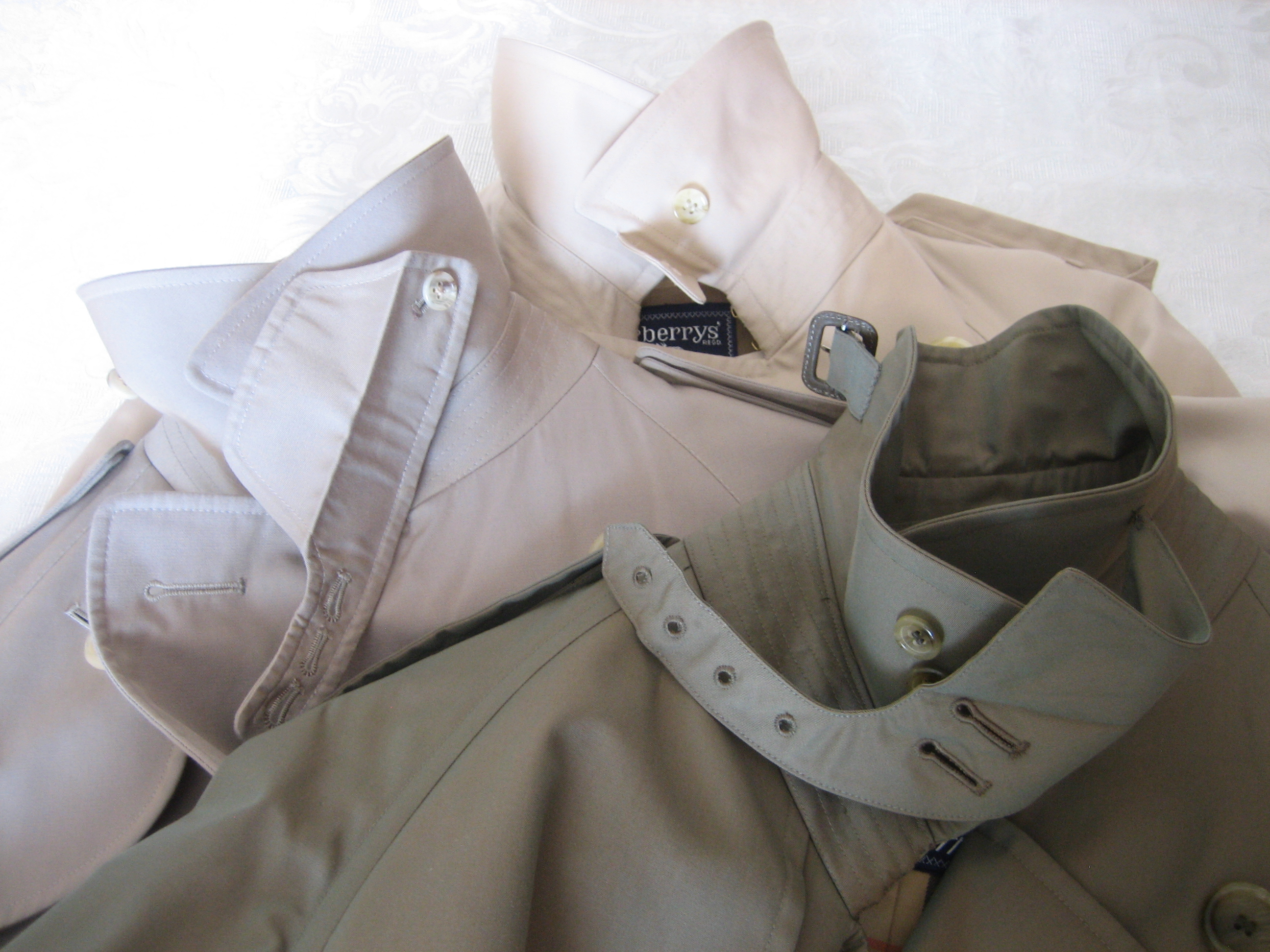 Tre tipi di sottogola del trench aperti pronti per chiudere bene il collo.